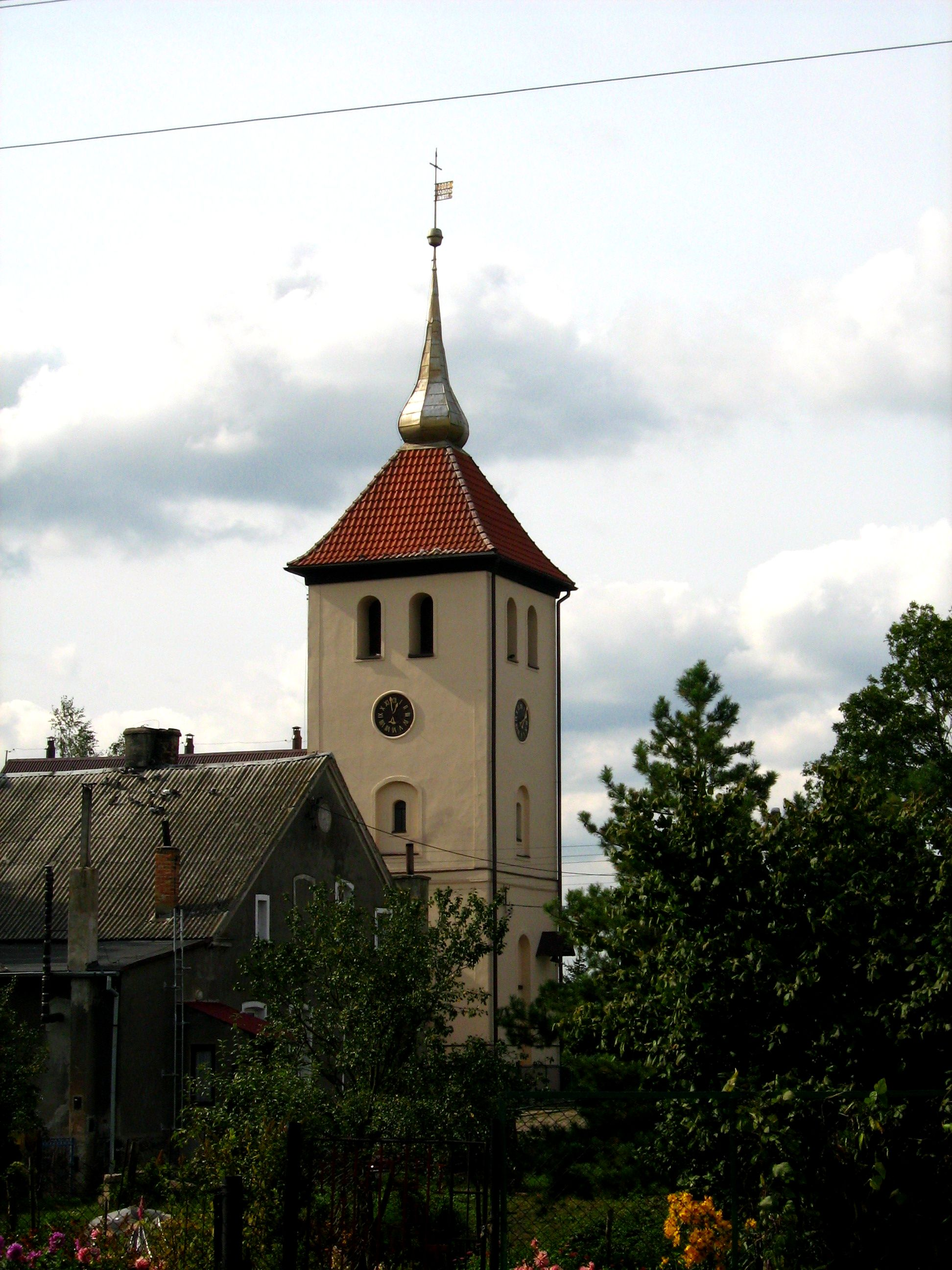 Rudno - wieża kościoła - relikt barokowego kościoła z 1761 r. Widok od strony północnej. Pierwotnie kościół ewangelicki, obecnie kościół filialny.